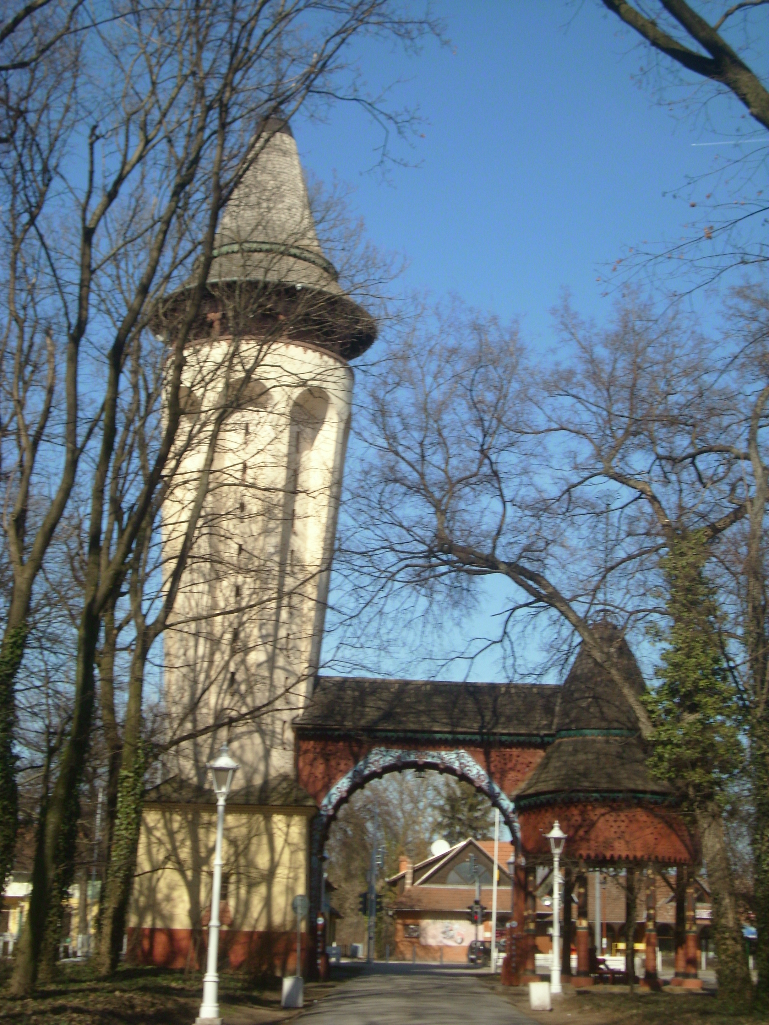 Водоторањ на Палићу , Палић , Суботица